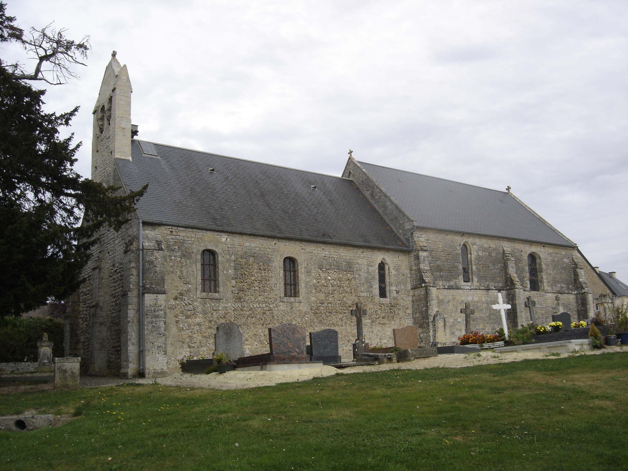 Église Saint-Sulpice, Grand Pré de la Croix (Inscrit, 2005) le clocher mur est perché au bout de la nef du XIè siècle, plus basse que le choeur du XIIIè siècle .